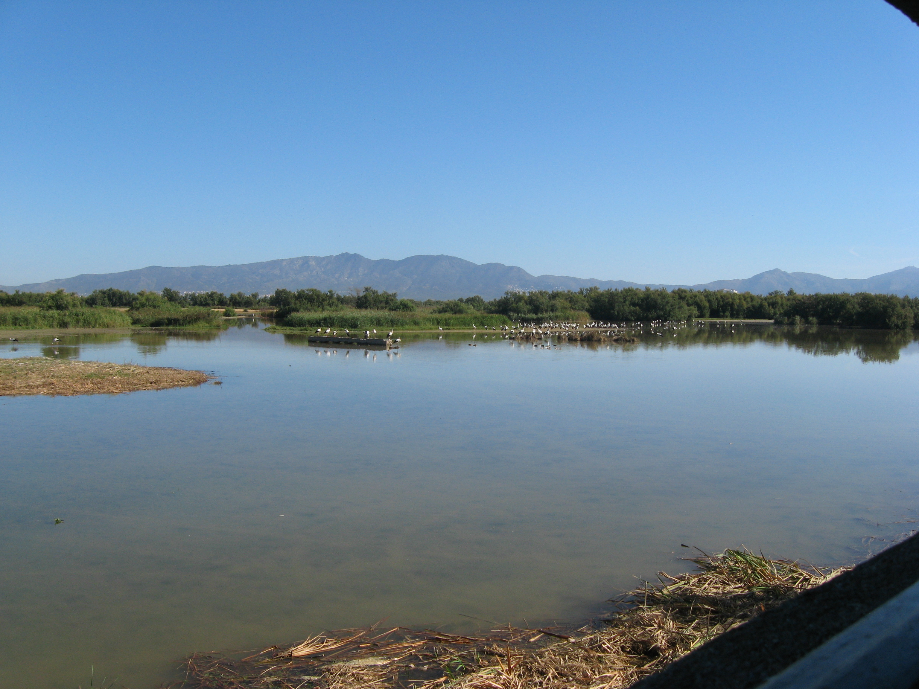 Naturpark Aiguamolls (Spanien/Katalonien) Datum: 15.09.2010 Urheber: Michael Pfeiffer alias Benutzer:Gordito1869 Quelle: privates Fotoarchiv des Urhebers